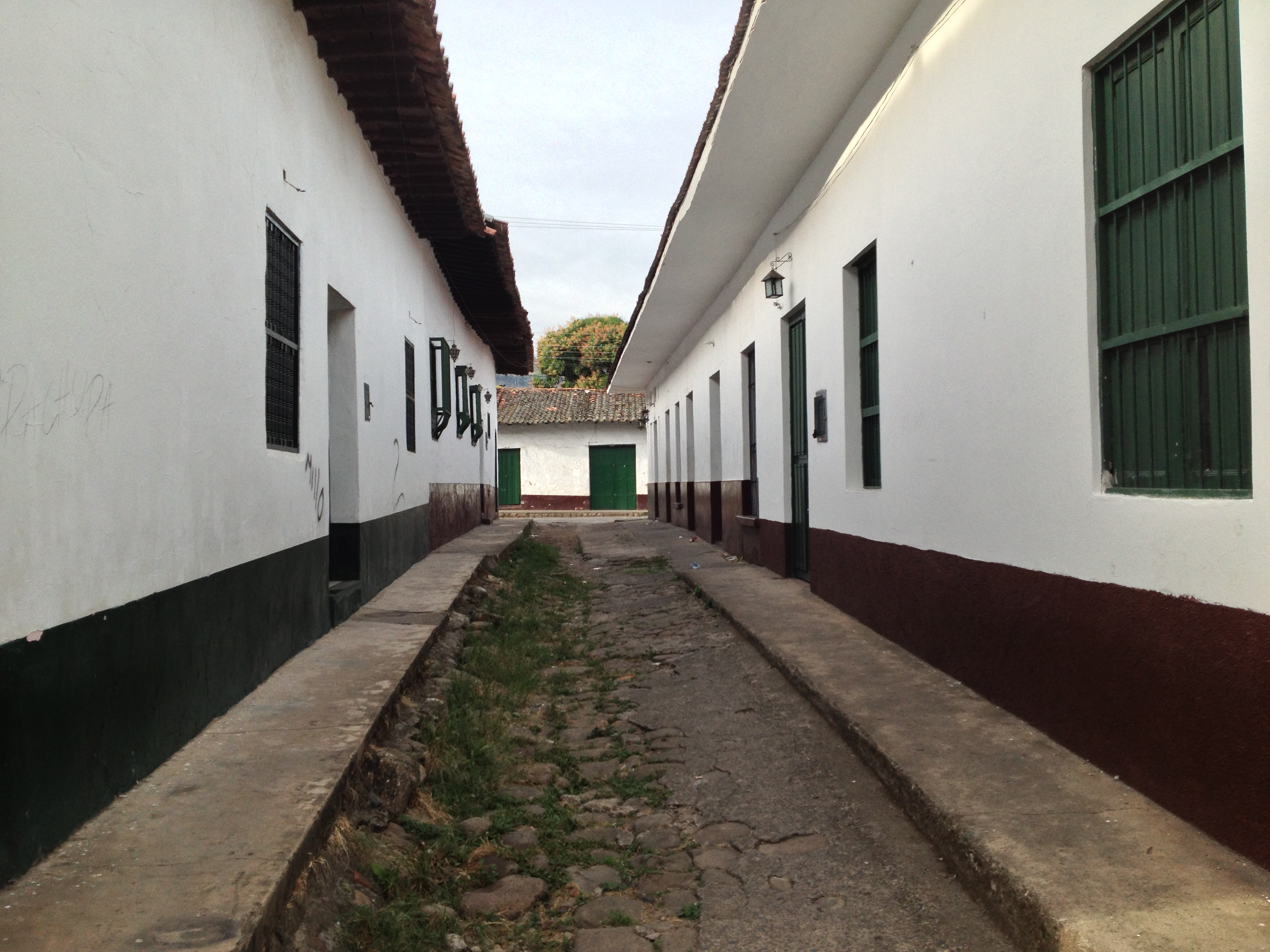 Sector Antiguo de la ciudad de Guaduas, esta estracha calle se encuentra muy cerca de la plaza principal y me llamo la atención por su lineas geométricas.